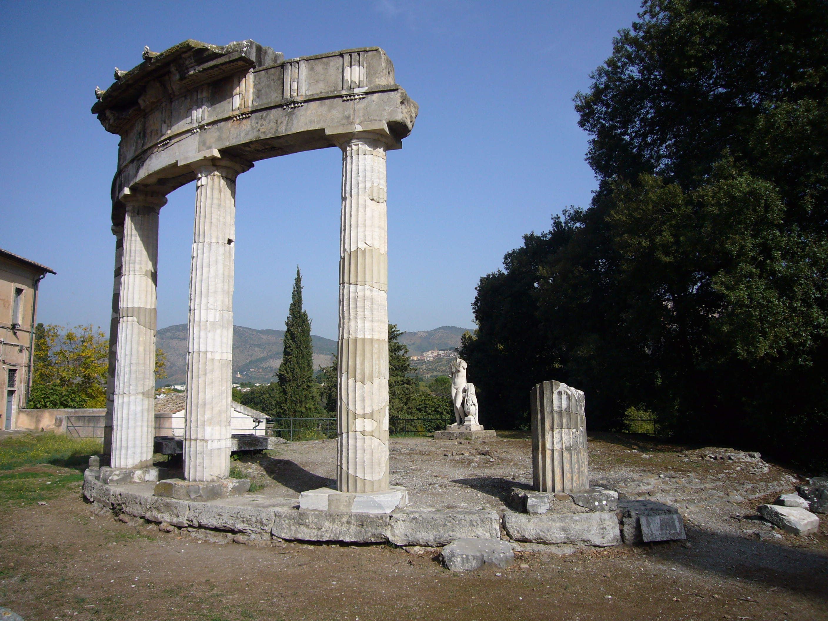 Tivoli, VillaAdriana: tempio di Venere nella tenuta Fede